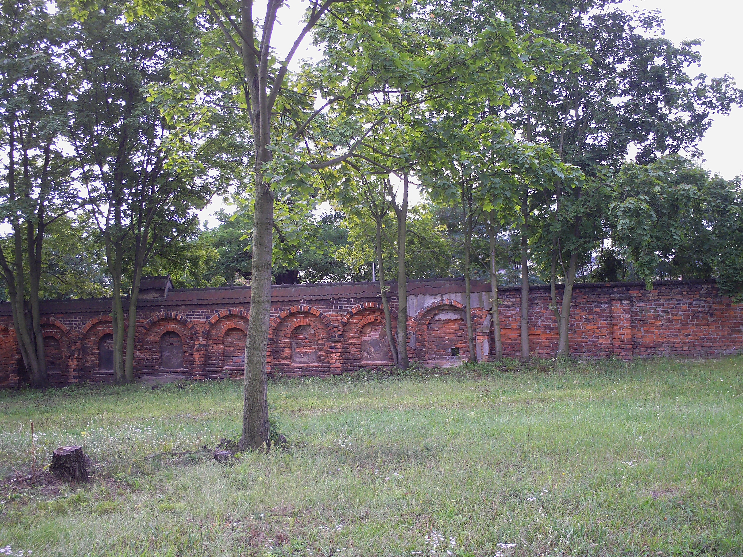 Friedhofsmauer des ehemaligen Zentalfriedhofs